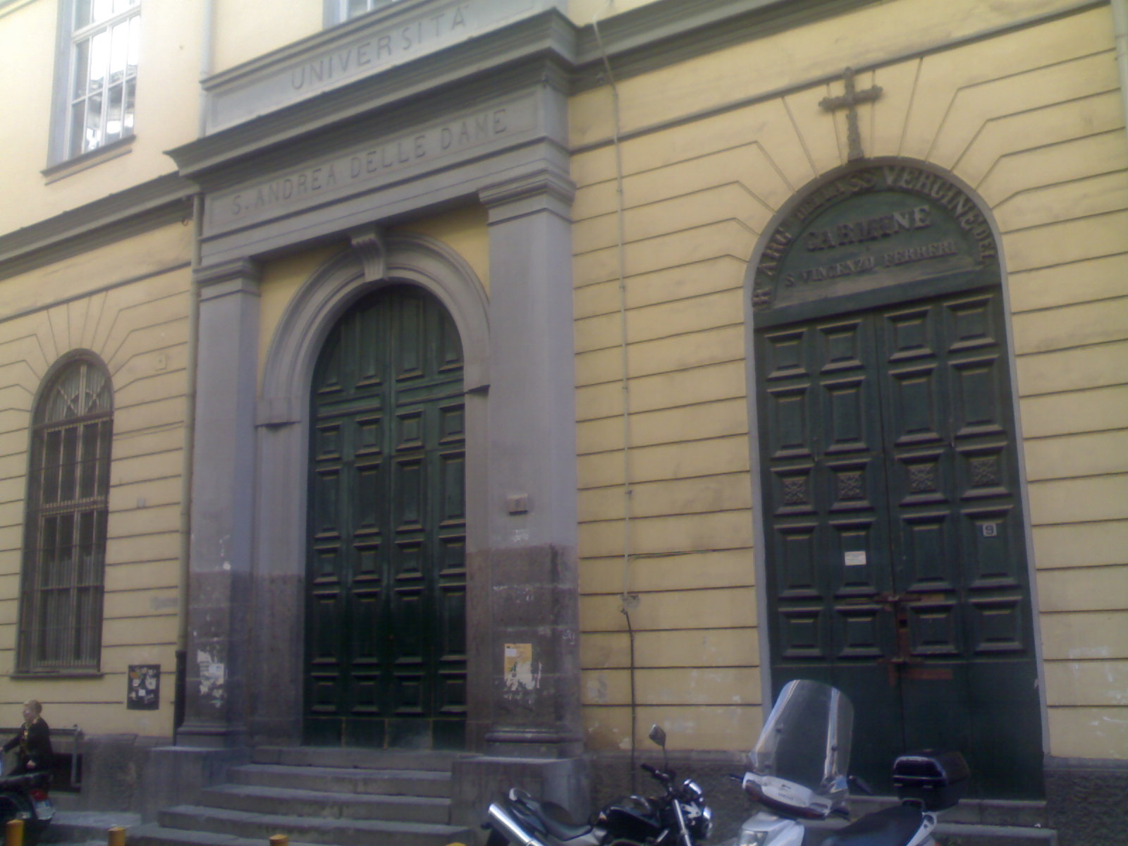 Complesso di Sant'Andrea delle Dame (Napoli)s